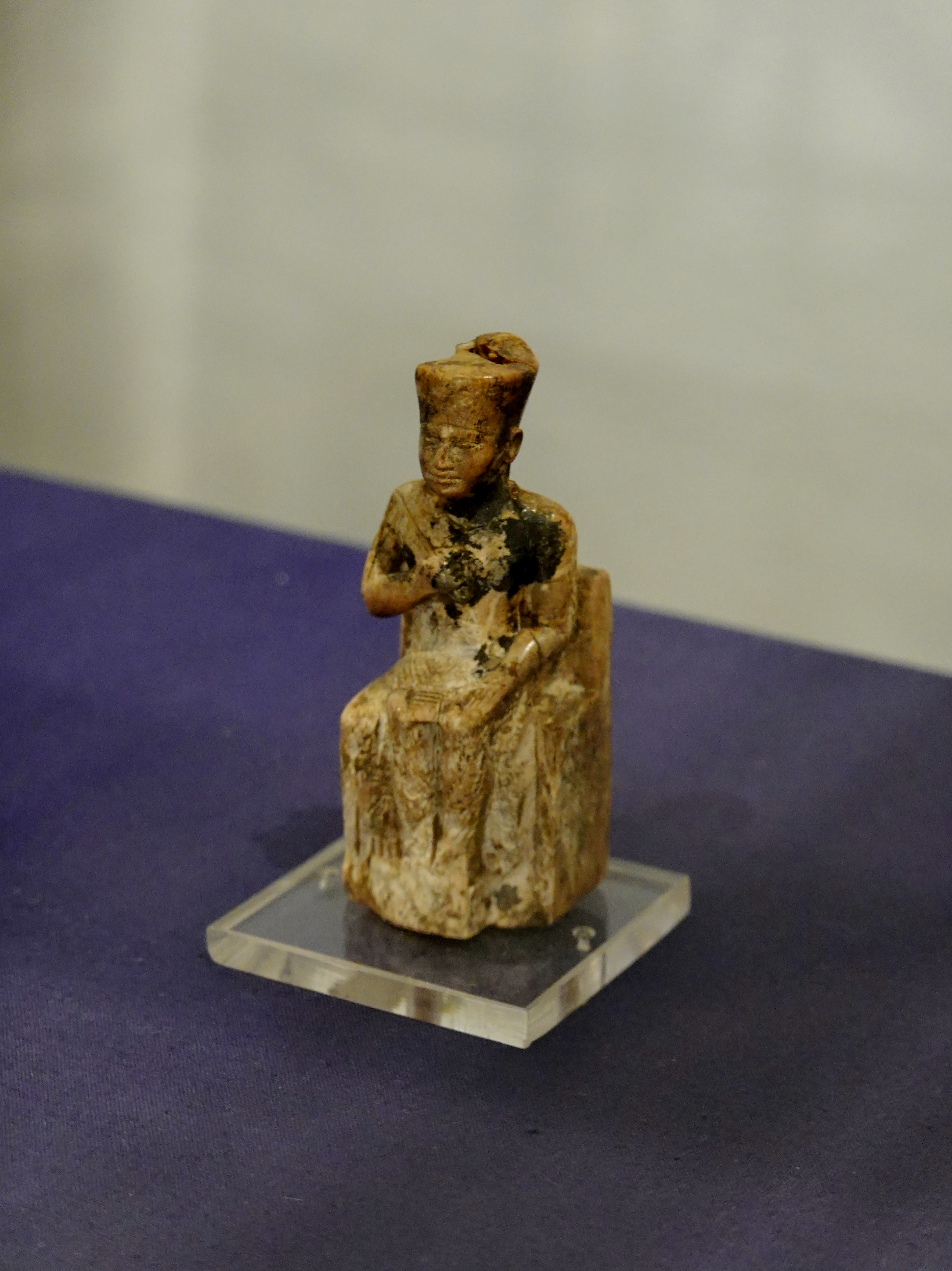 Statuette des sitzenden Königs Cheops der 4. altägyptischen Dynastie (Höhe: 7,5 cm, Breite: 2,5 cm, Tiefe: 2,9 cm), gefunden 1903 in Abydos, ausgestellt im Ägyptischen Museum in Kairo, Ägypten